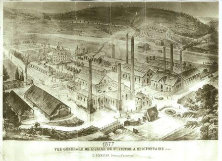 Vue gènèrale de l'usine de Saint-Victor à Sérifontaine